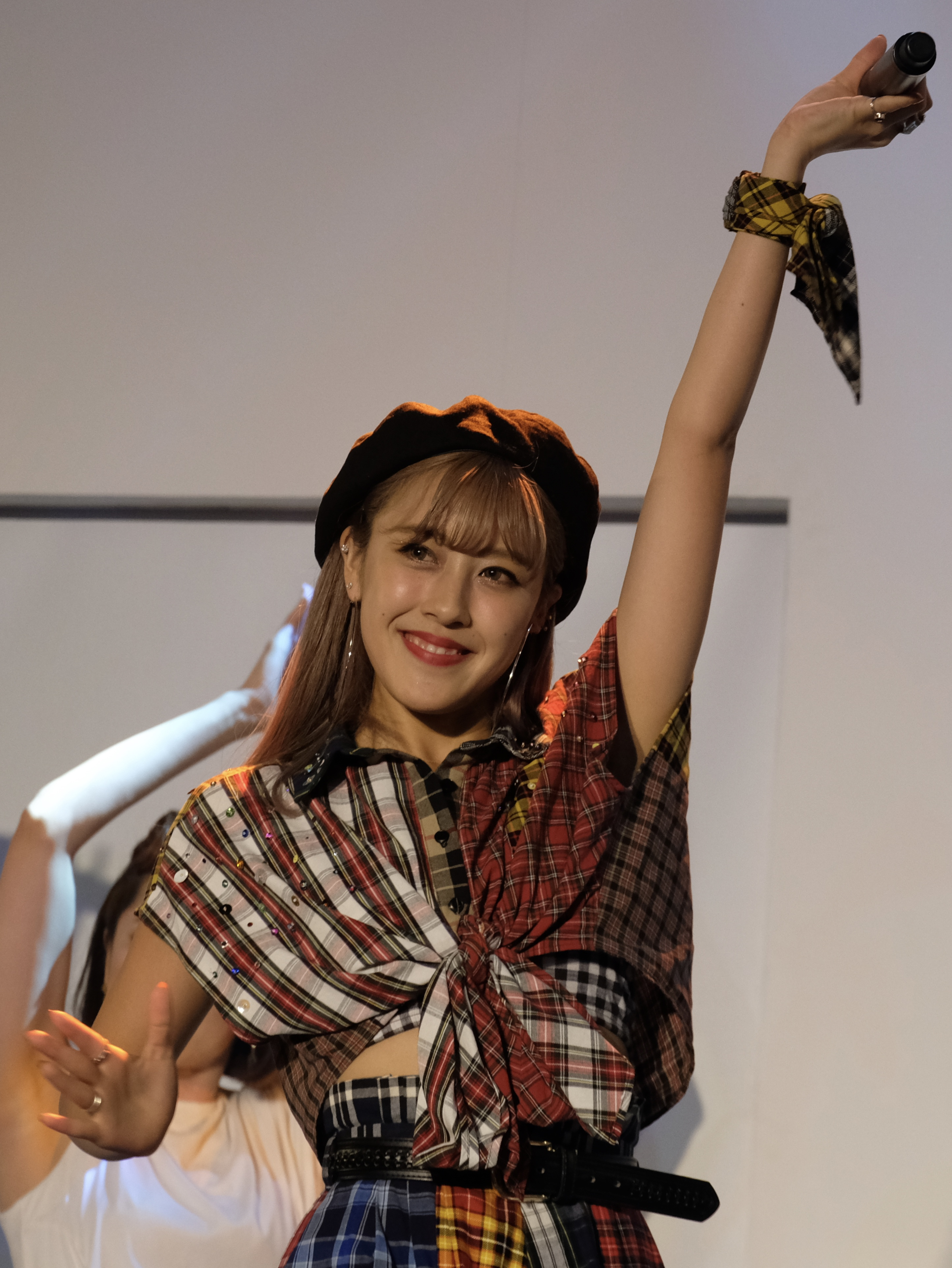 The 2nd ASEAN-Japan TV Festival Public Event